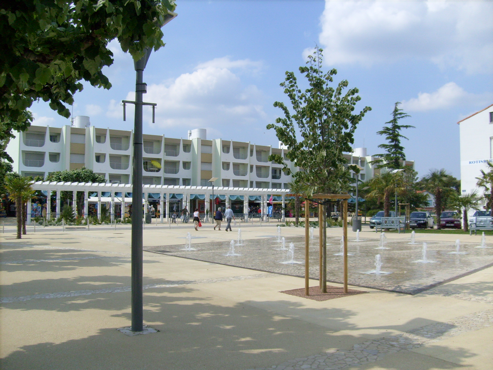 Place centrale de Saint-Palais sur mer